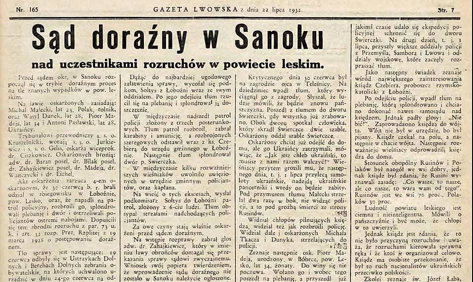 "Gazeta Lwowska" z 22 lipca 1932, artykuł dotyczący masowego wystąpienia ludności chłopskiej w Bieszczadach przeciwko władzy sanacyjnej.